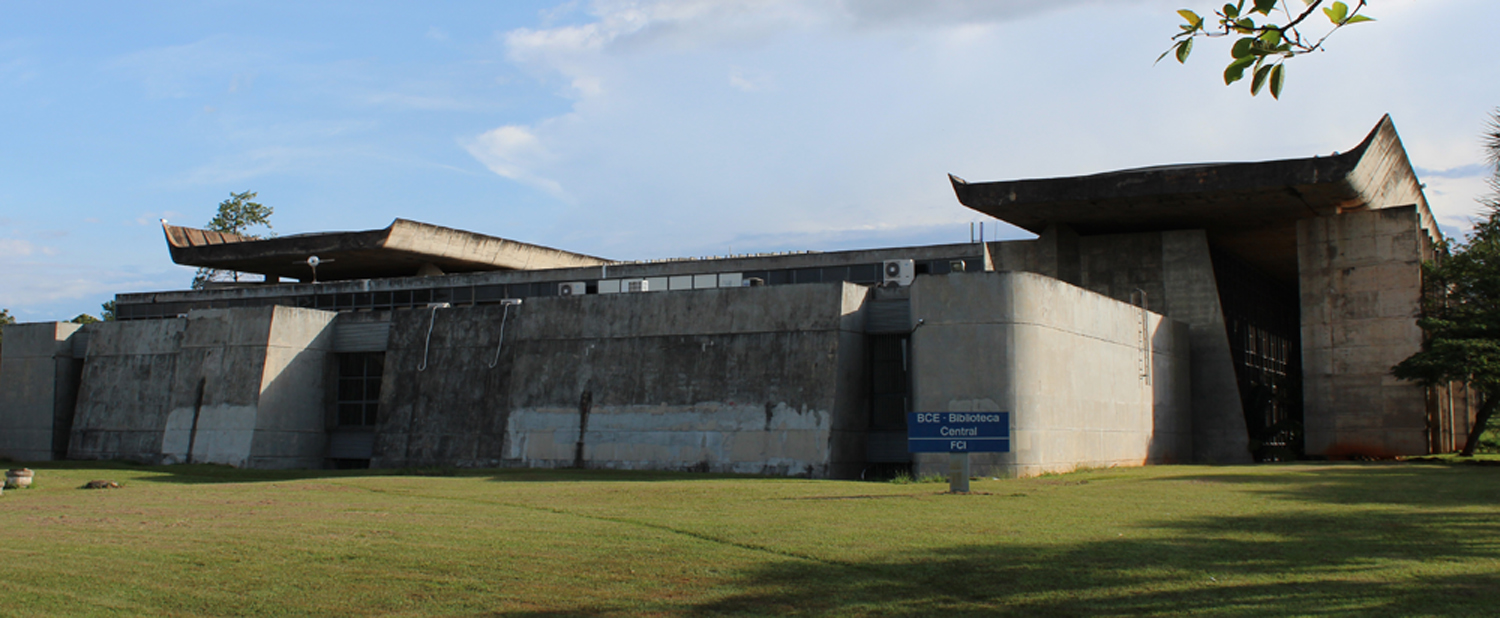 Biblioteca Central da Universidade de Brasília, vista lateral.